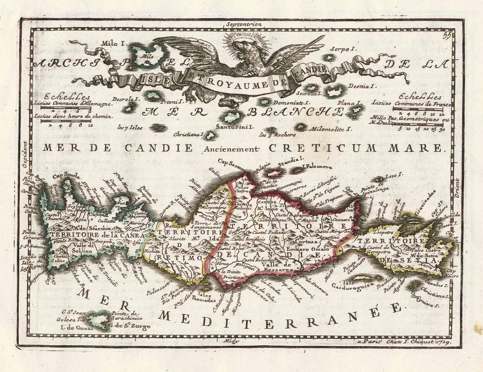 historische Karten von Kreta / Isle et Royaume de Candie